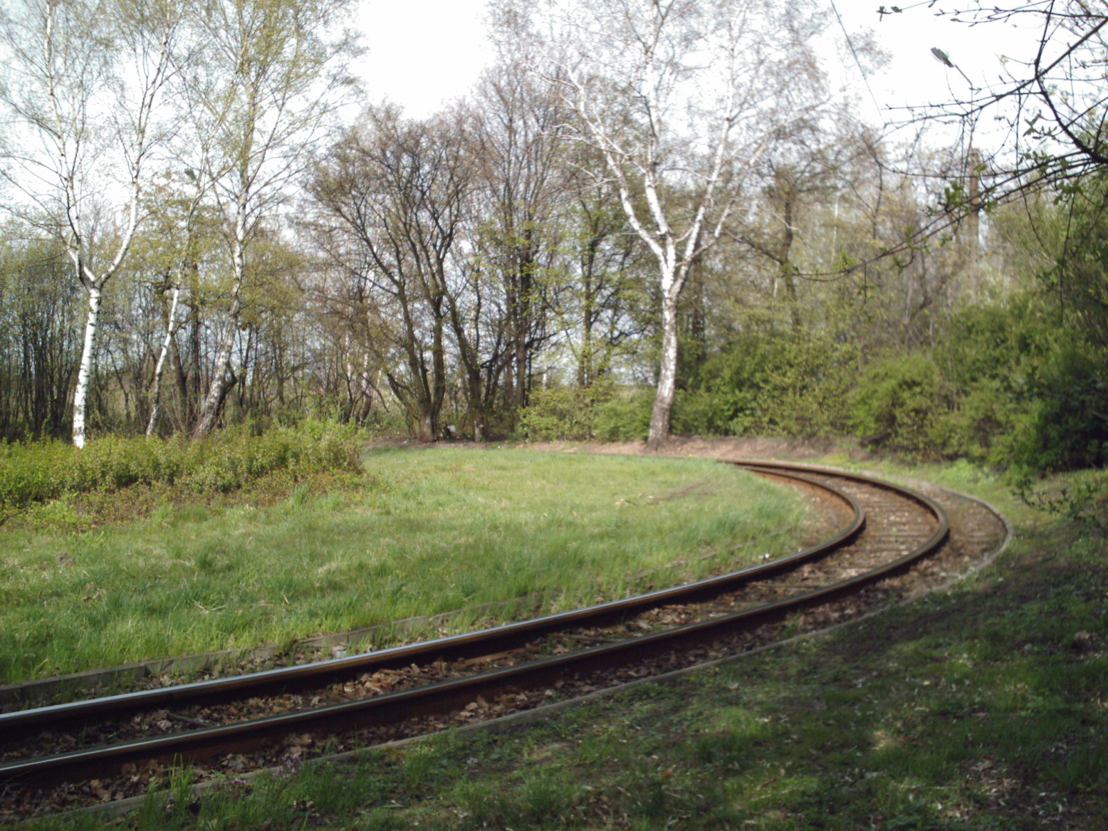 Krańcówka {pętla) tramwajowa w Łodzi na Stokach, przy ulicy Giewont